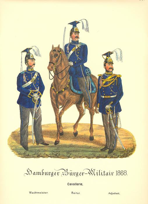 Cavallerie des Hamburger Bürgermilitärs 1868, hierː Wachtmeister, Reiter und Adjudant.